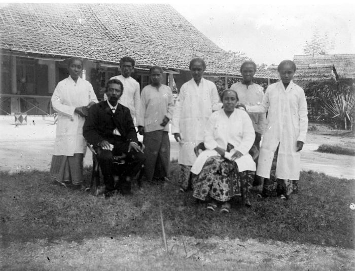 Negatief. Regent van Porto met familie te Saparua